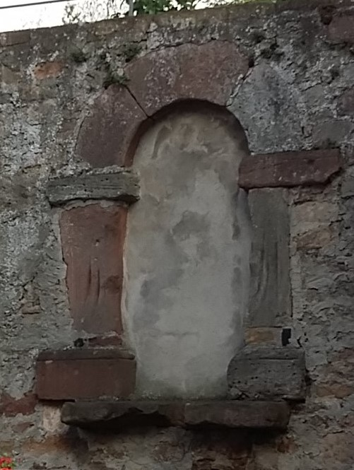 Historischer Zugang zum ehemaligen Kirchhof von Ueberau.